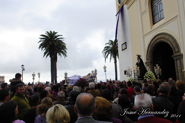 Salida procesional del Santo Entierro, en la tarde del Viernes Santo. Semana Santa de la Villa de la Orotava